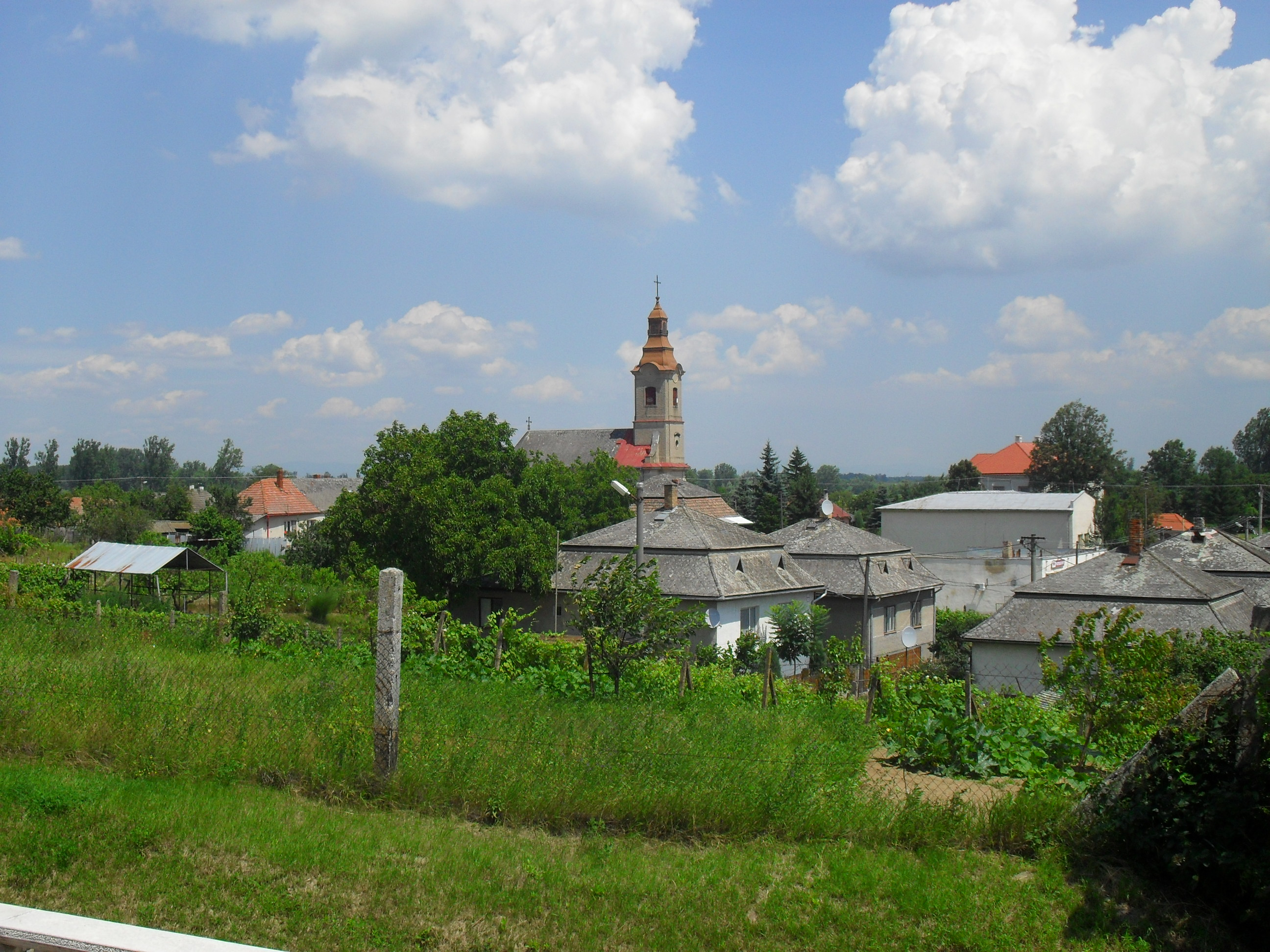 Véke - a falu látképe a temetőből